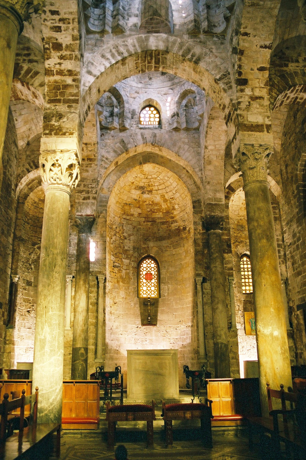 San Cataldo, Palermo Interior view